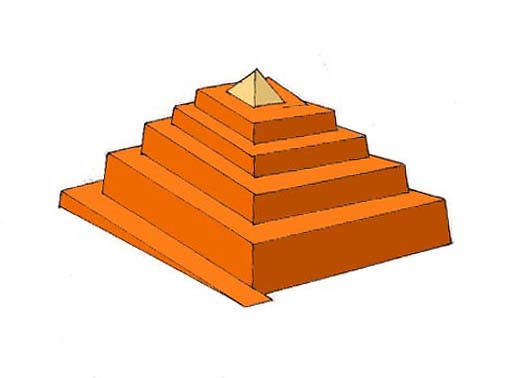 Rampe hélicoïdale (ou enveloppante) préconisée par Georges Goyon et N. Wheeler